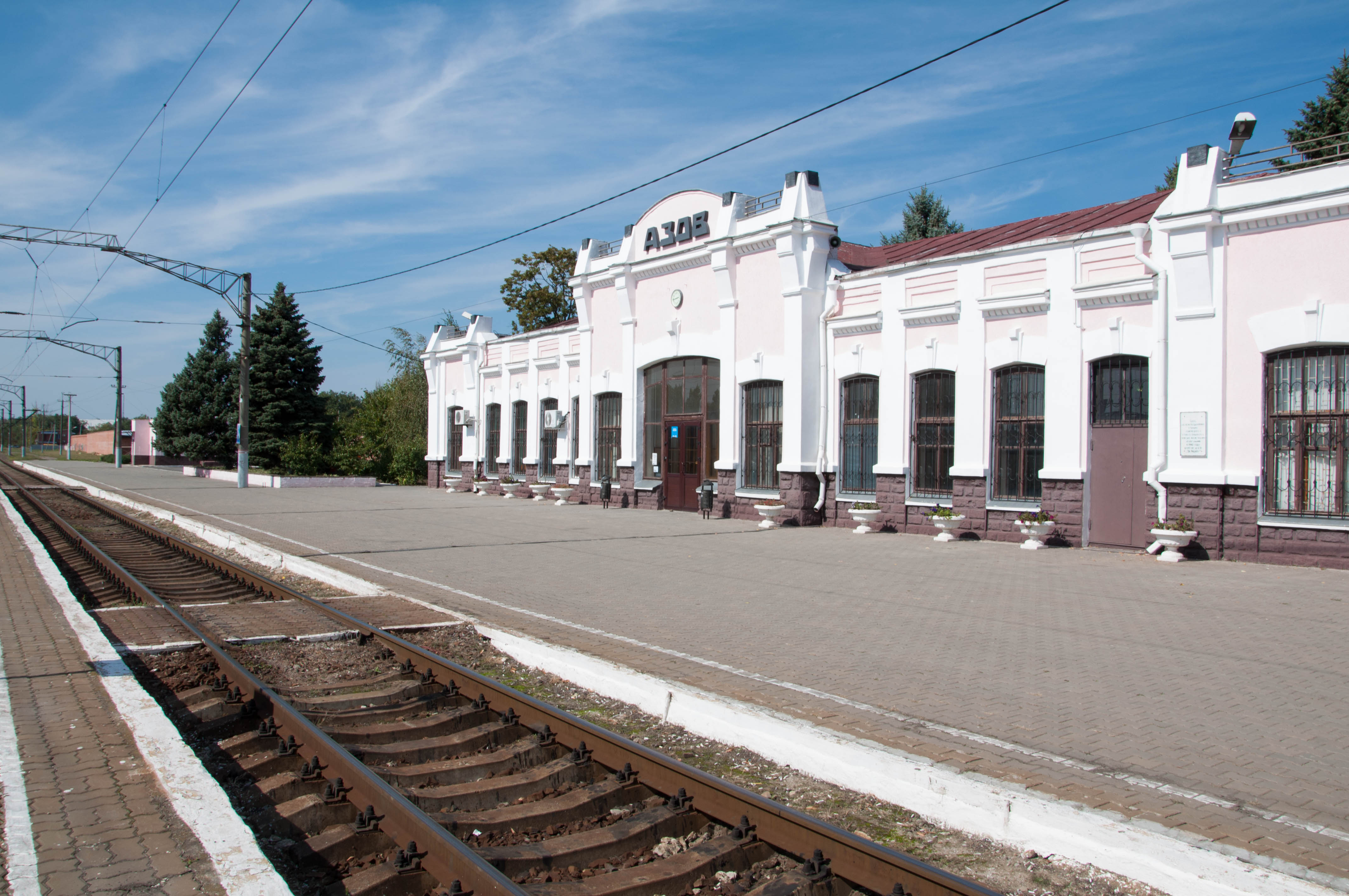 Здание вокзала (Ростовская область, Азов, Привокзальная улица, 12)